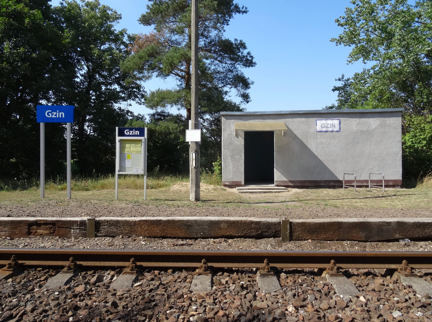 Gzin przystanek kolejowy, gmina Dąbrowa Chełmińska, linia kolejowa nr 209 Bydgoszcz-Chełmża